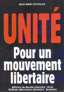 Brochure Unité Pour un mouvement libertaire 2001 Editions du Monde libertaire Editions Alternative Libertaire Belgique